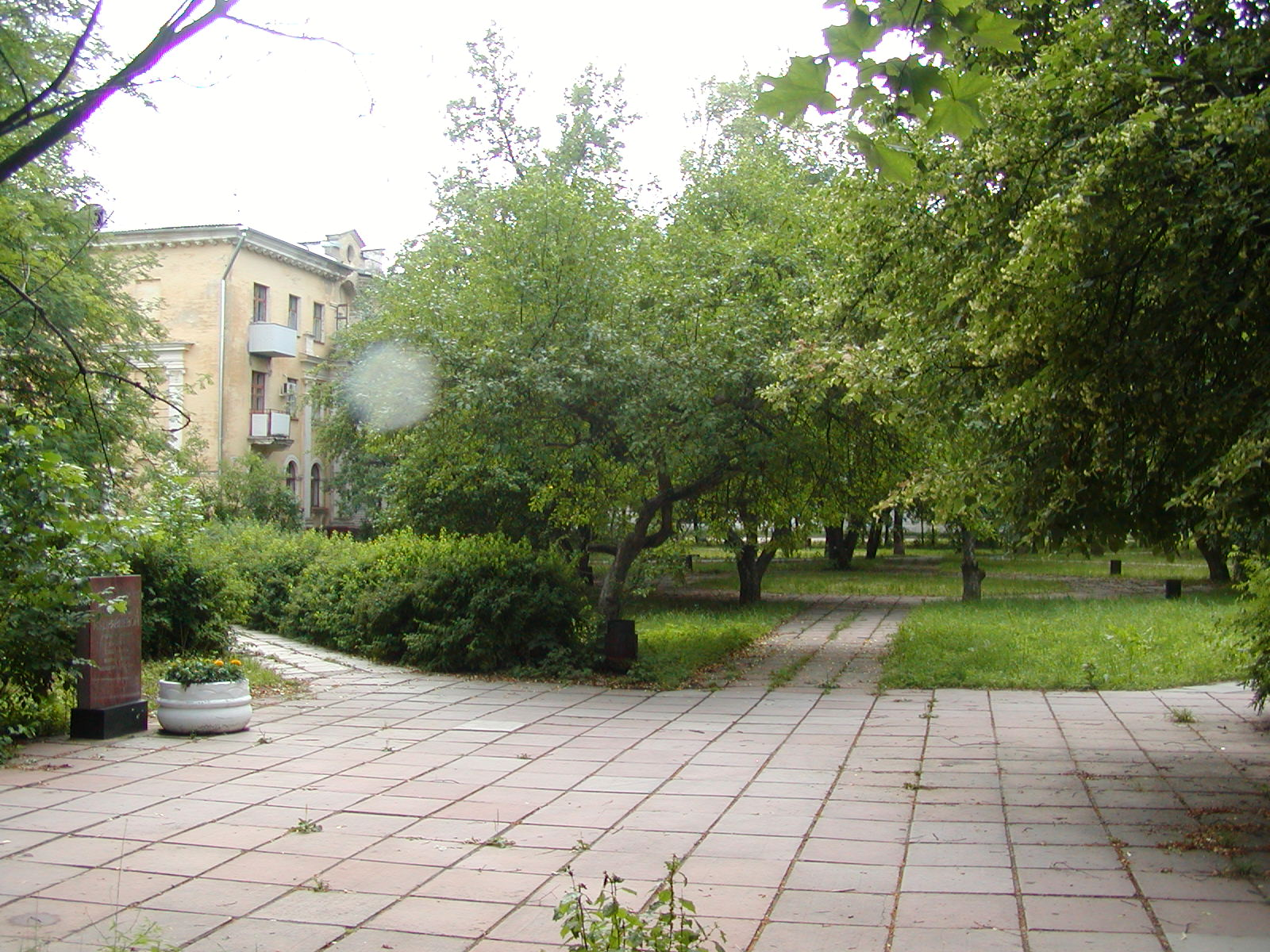 Сквер имени Стефании Алексеевны Кудрявцевой на площади Бондаренко в Обнинске. Слева на фотографии установленная в честь Кудрявцевой памятная стела.